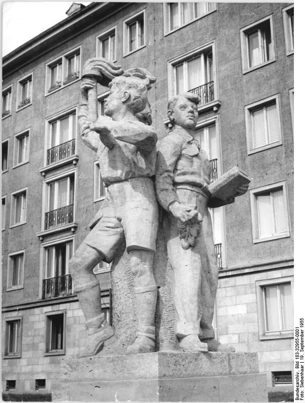 Dresden, Grunaerstraße, Plastik Zentralbild Siebenhaar 19.9.1955 Dresden 1955 Grunaerstrasse. Vor den neuerbauten Wohnblöcken steht die Sandsteingruppe: "Jungpioniere".